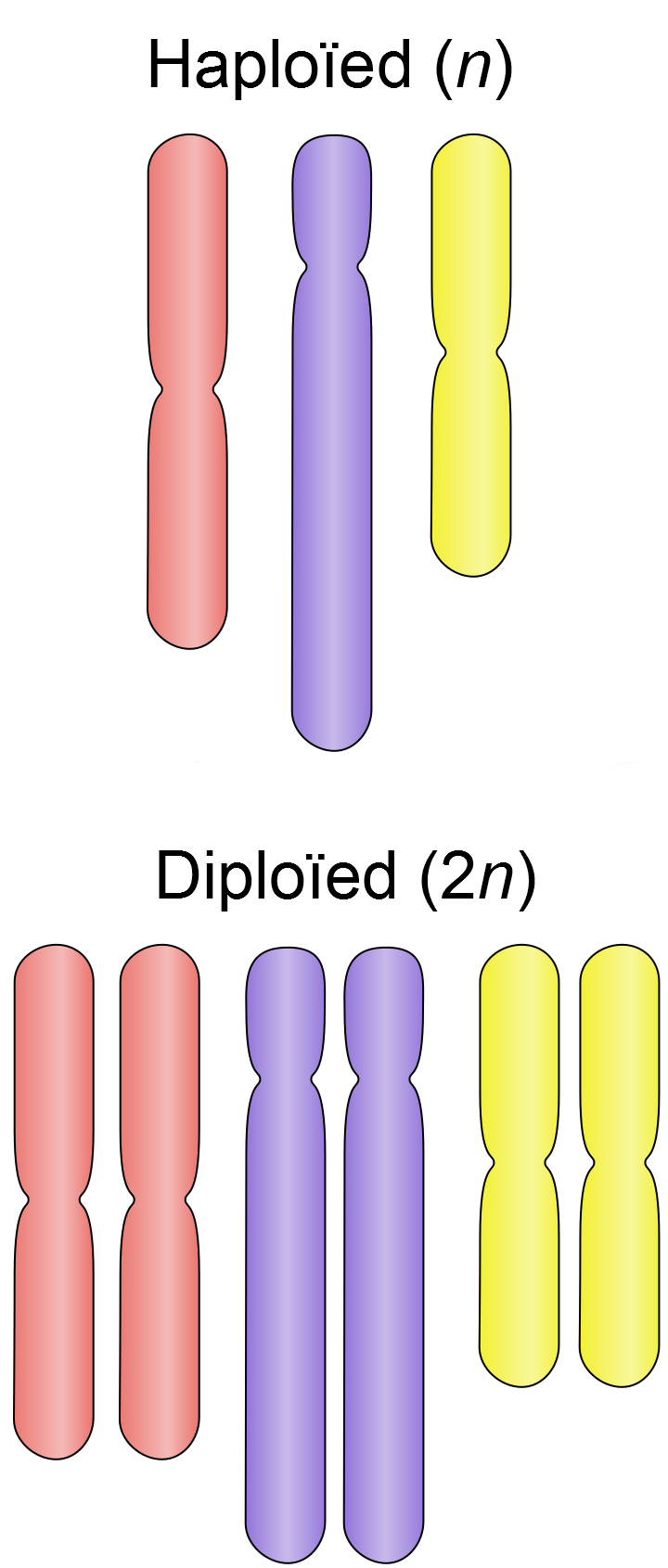 Chromosoomstelle